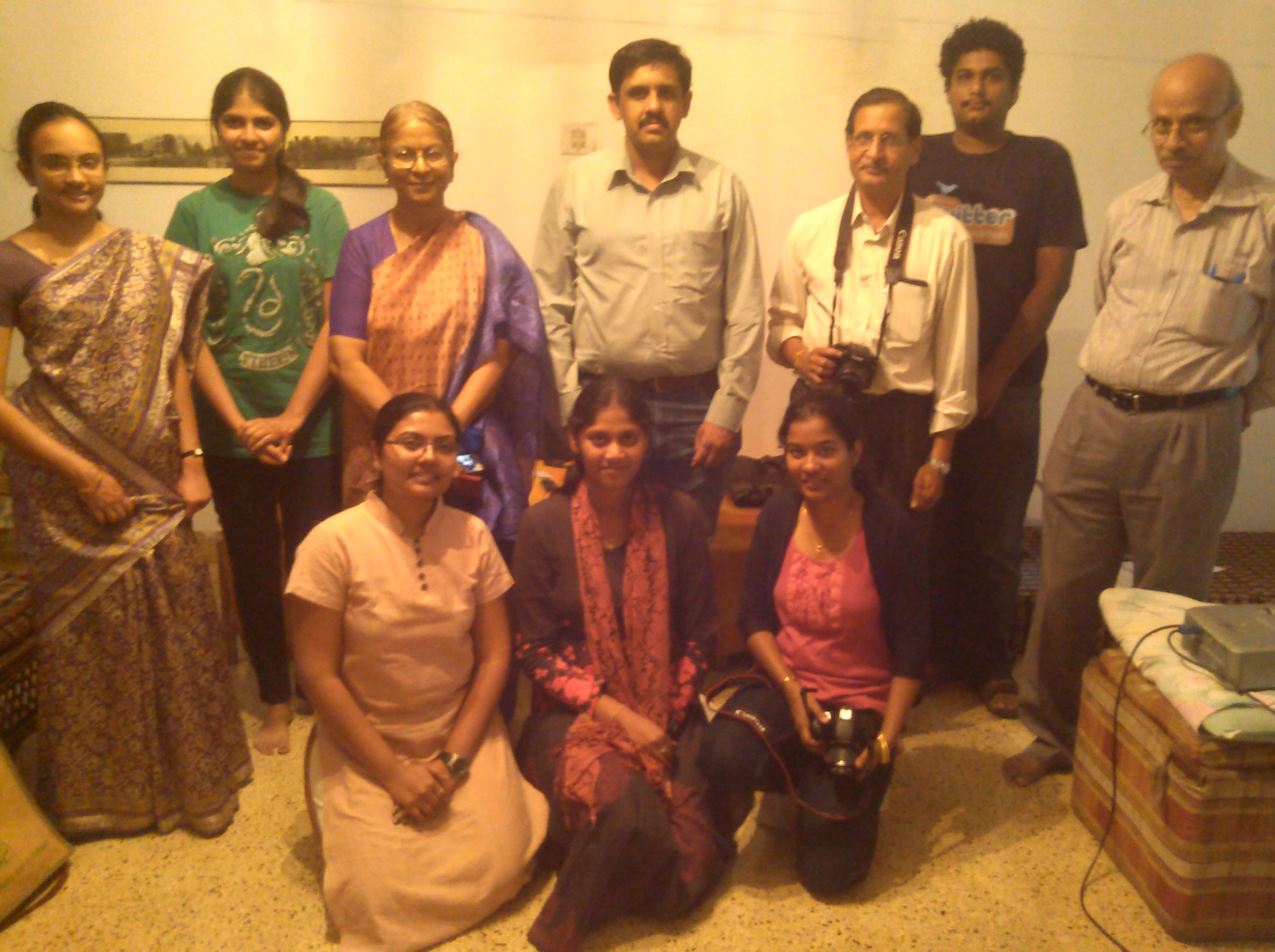 wikiwomen event bangalore